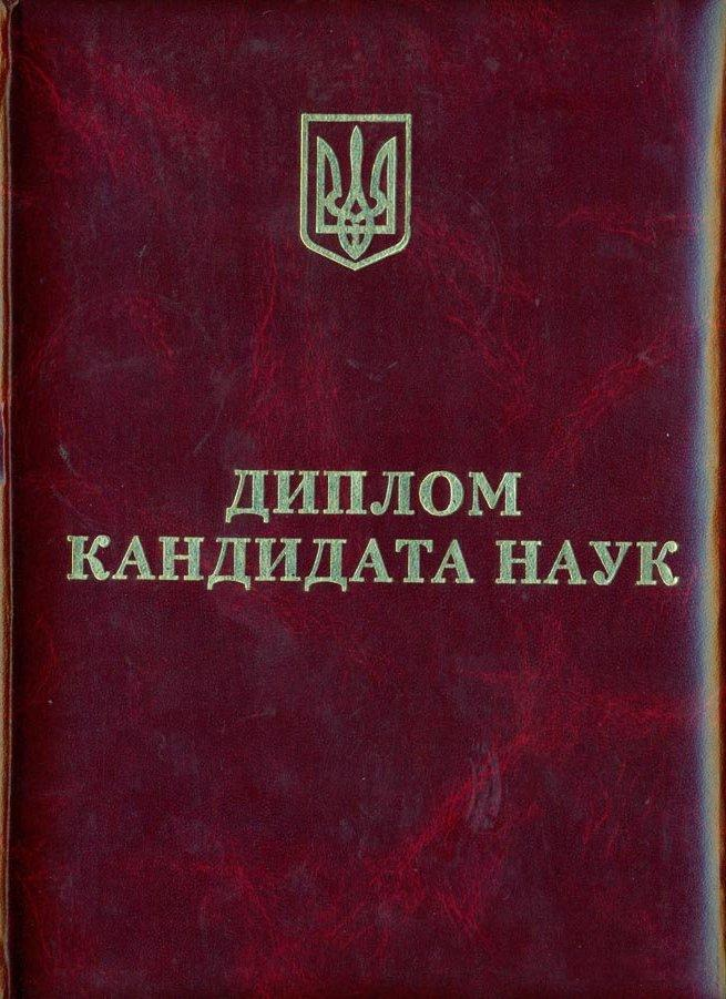 обкладинка диплома кандидата наук